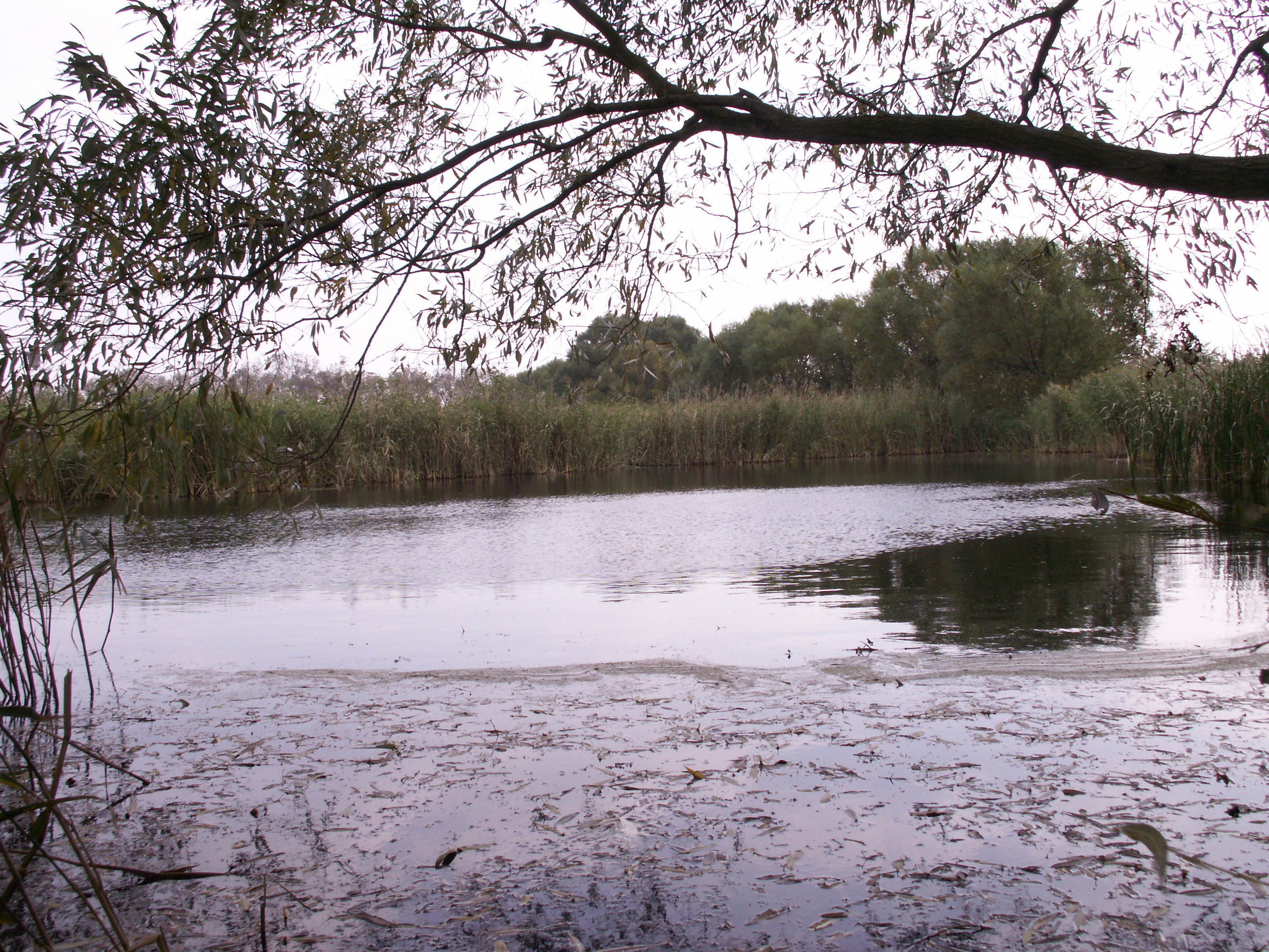 přírodní památka Mikulovické jezero (okres Znojmo)